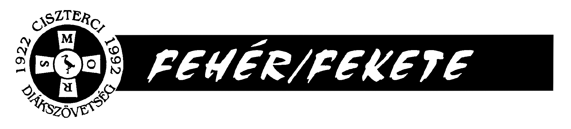 A Ciszterci Rend Nagy Lajos Gimnáziumának Fehér/Fekete című diákújságjának logója 1991-2005 között.